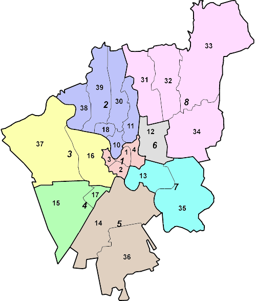 Quartieri e circoscrizioni di Verona Centro storico 1. Città antica 2. Cittadella 3. San Zeno 4. Veronetta Quartieri moderni 10. Borgo Trento 11. Valdonega 12. Borgo Venezia (che comprende Borgo Trieste) 13. Porto San Pancrazio 14. Borgo Roma 15. Santa Lucia 16. Borgo Milano (che comprende le località di Chievo e Saval) 17. Golosine 18. Ponte Crencano Frazioni 30. Avesa 31. Quinto 32. Santa Maria in Stelle 33. Mizzole 34. Montorio 35. San Michele 36. Cadidavid 37. San Massimo 38. Parona 39. Quinzano